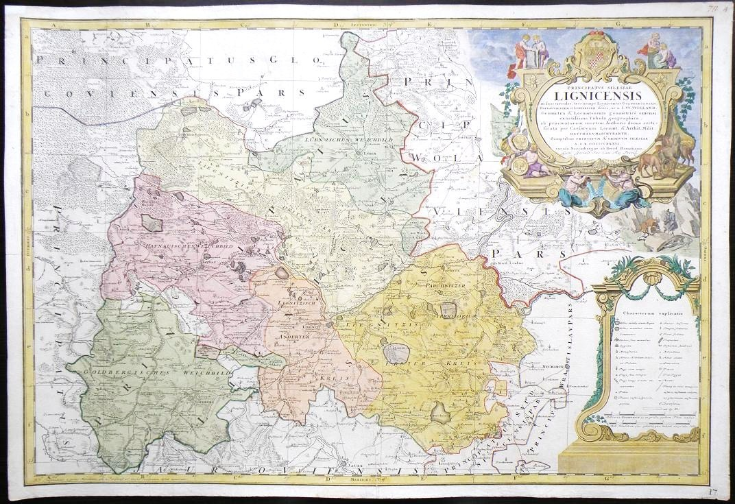 Podział ksiestwa na okręgi administracyjne